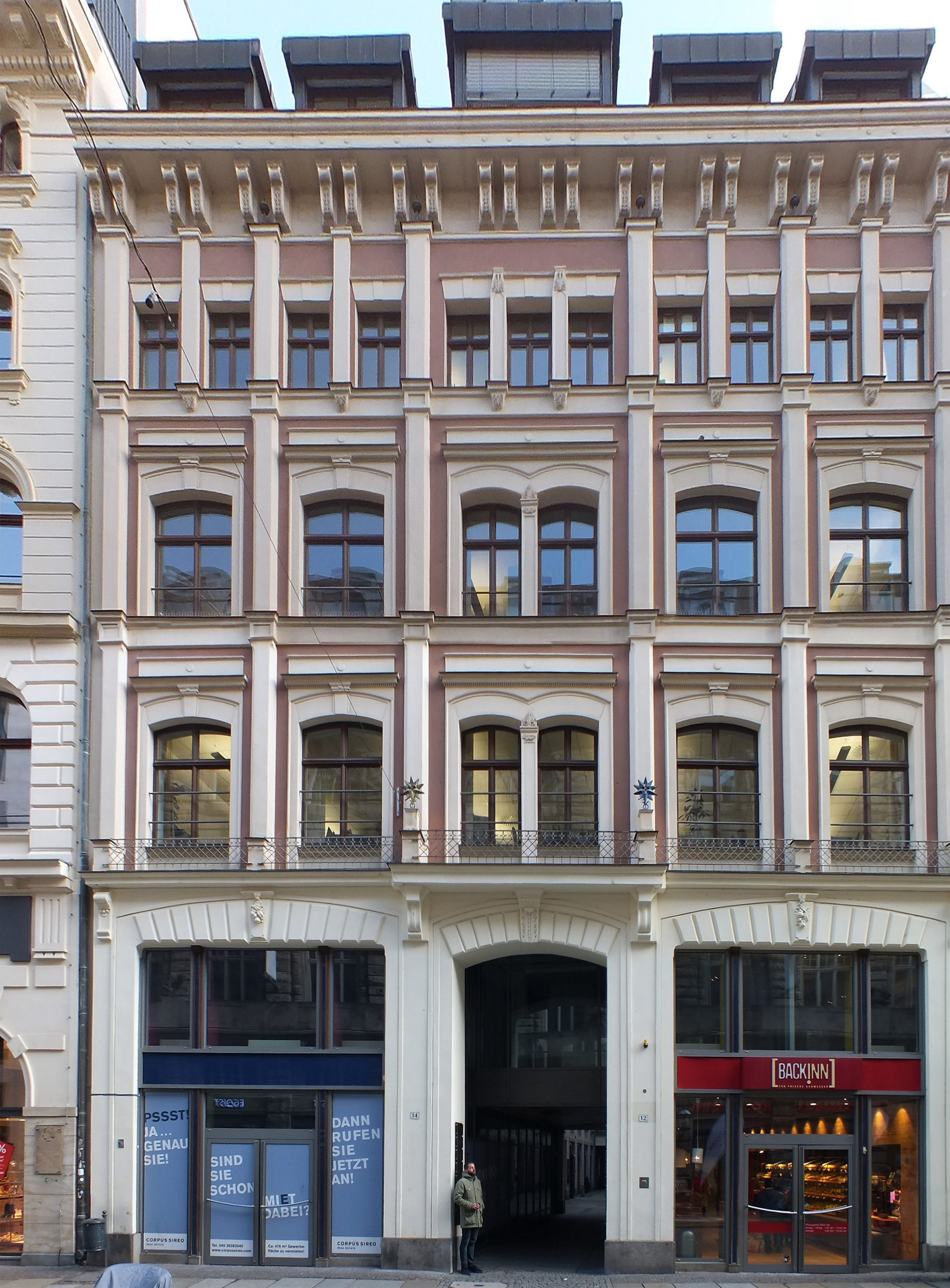 Straßenfront des Hauses Blauer und goldener Stern, Hainstraße 14 in Leipzig, Passage zu Kretschmanns Hof